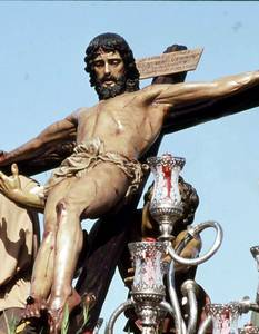 cristo de la exaltacion de jerez